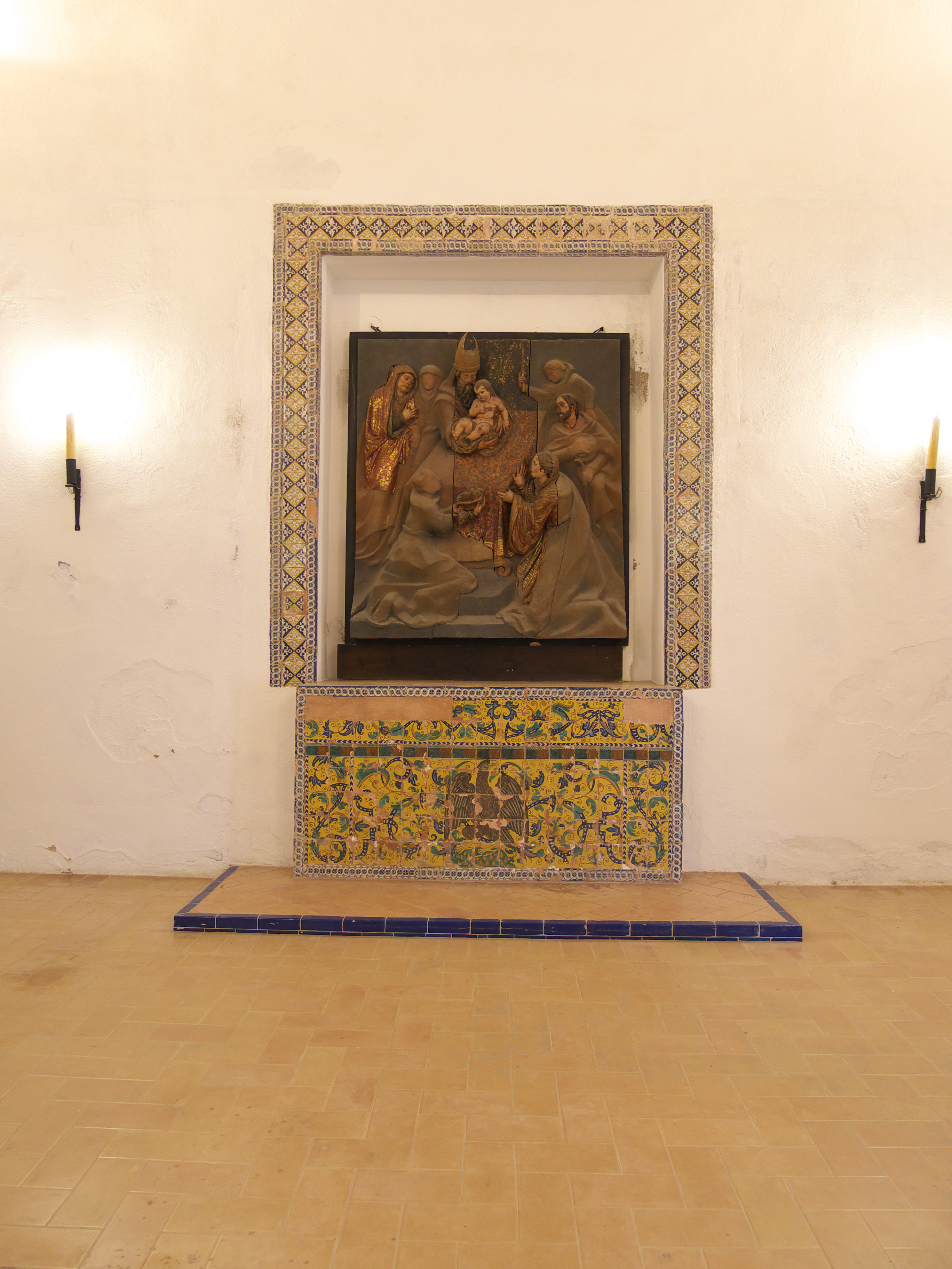 Retablo con relieve en madera de la Presentación de Jesús en el Templo, Juan Martínez Montañés (1606)